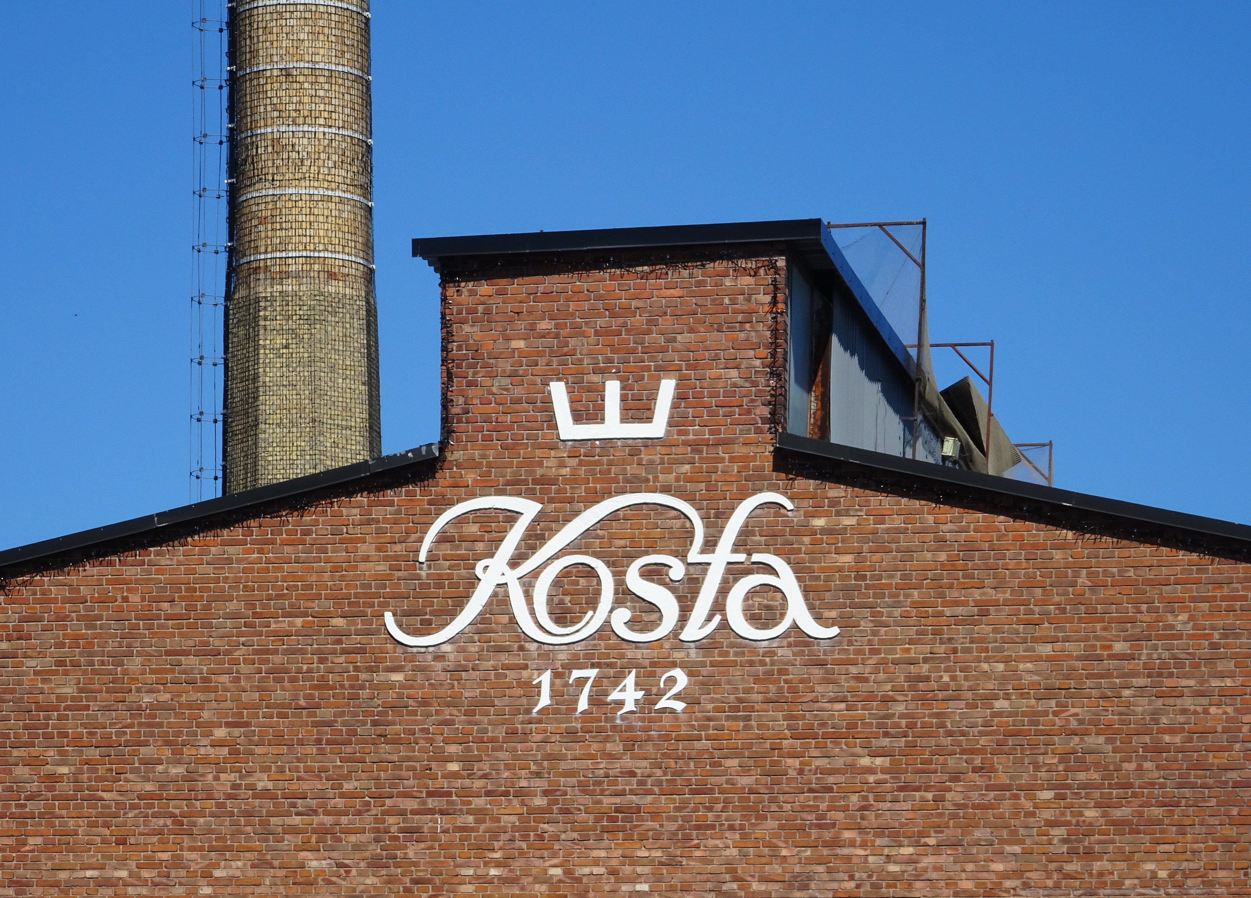 Kosta fabriken